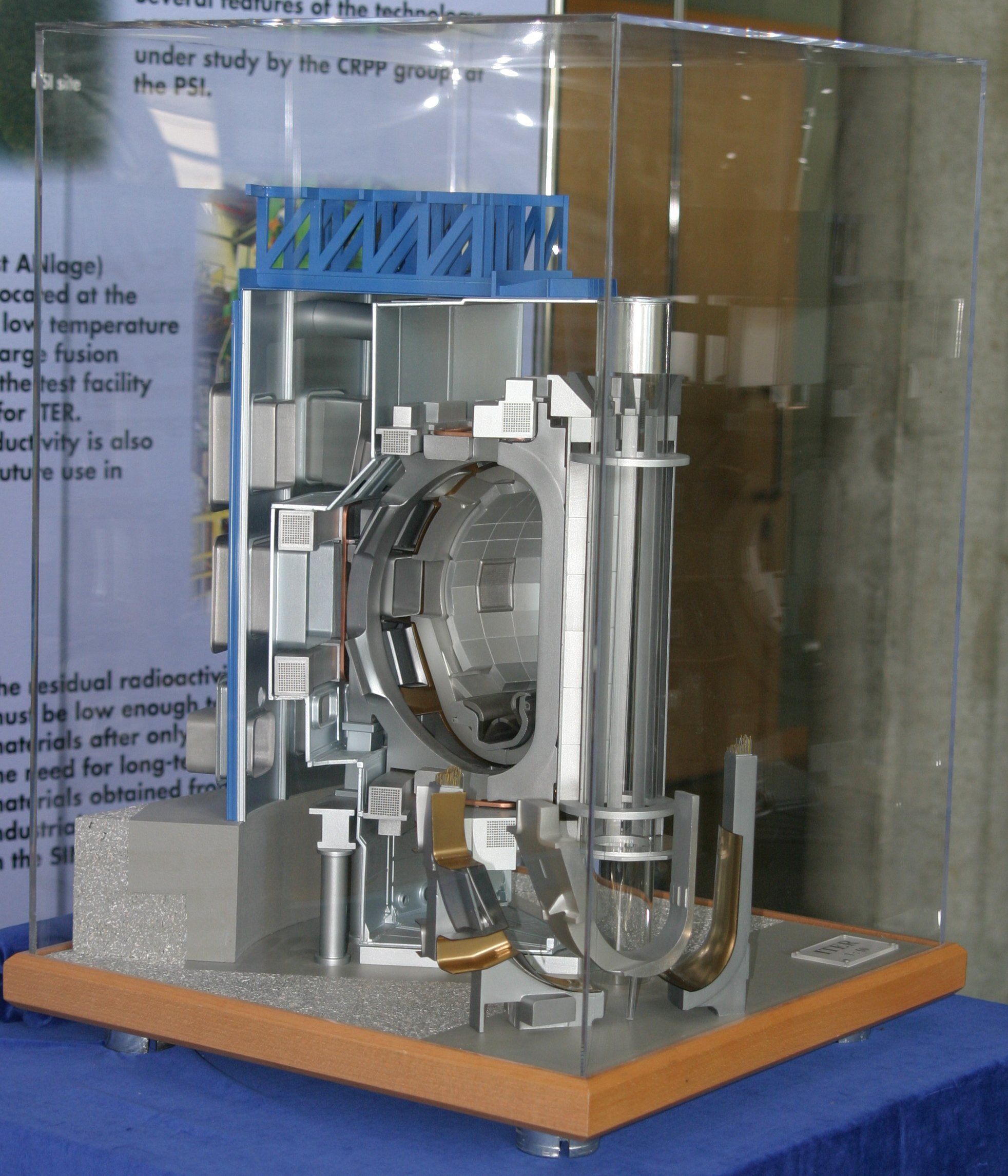 ITER